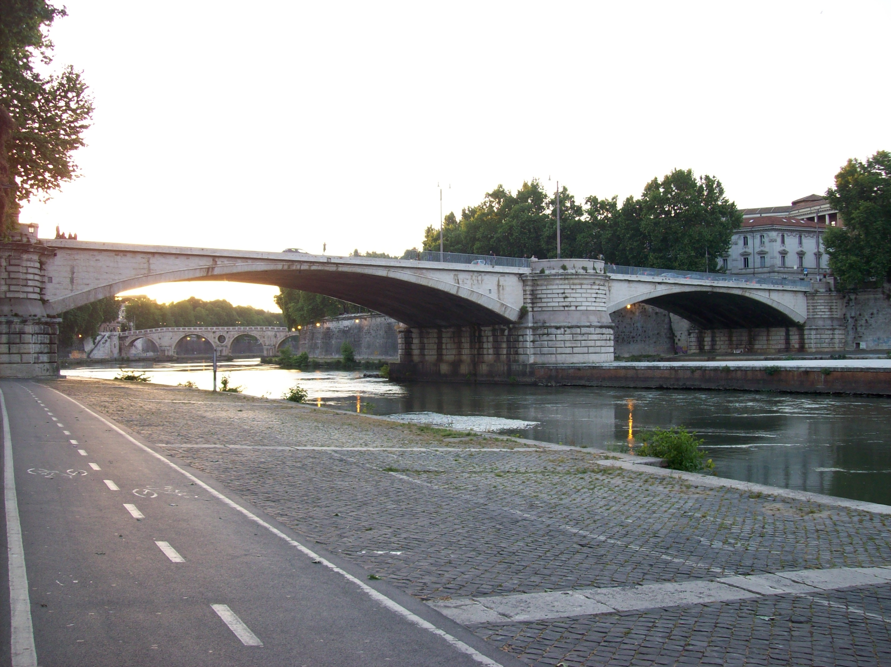 Ponte Garibaldi in Rome